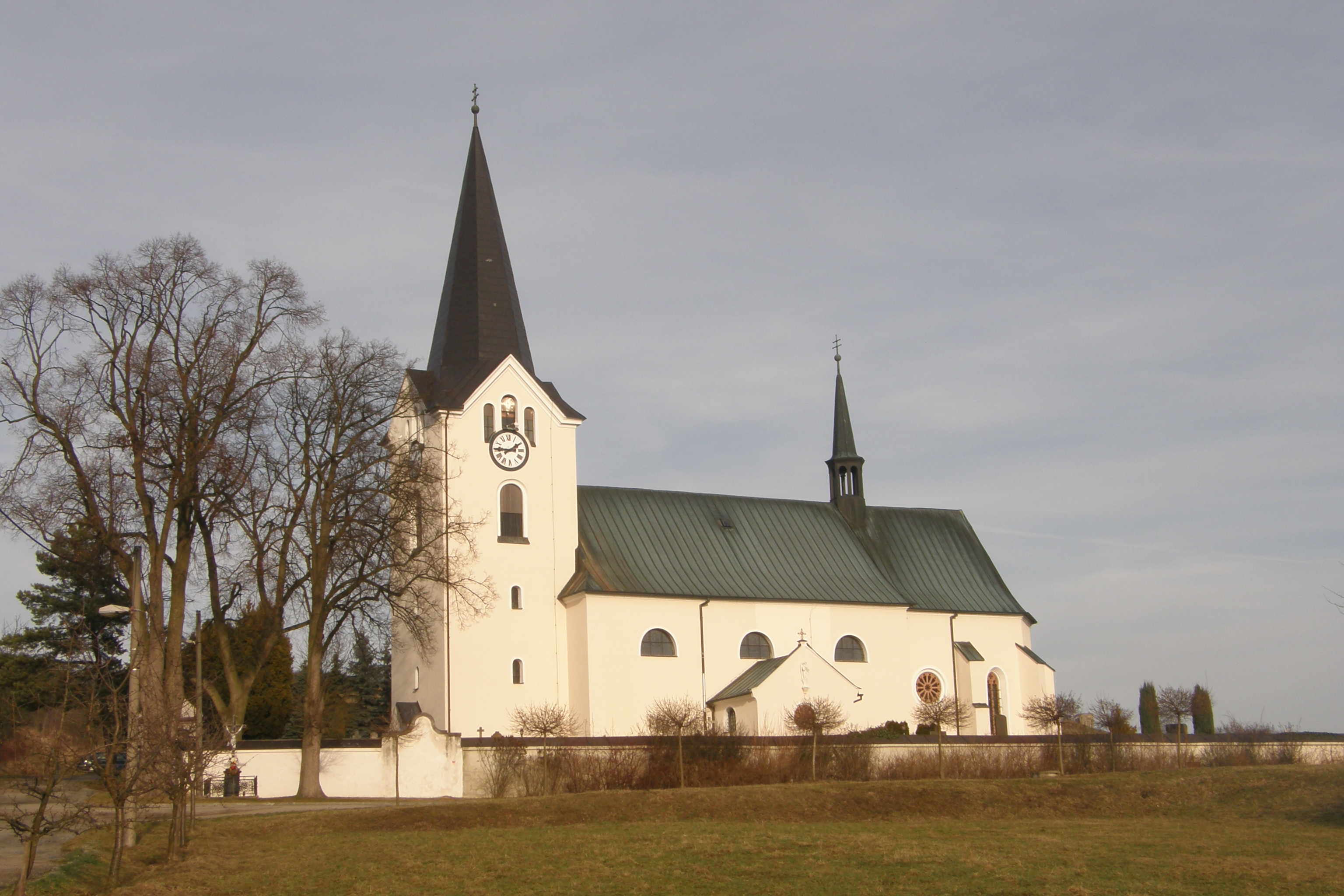 Kostel Nejsvětější Trojice v Drnovicích v okrese Blansko